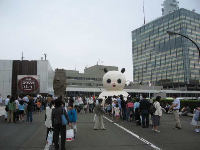 "Shibuya de Do-Mo 08" by NHK Golden weeks event. 2008.5.3-6